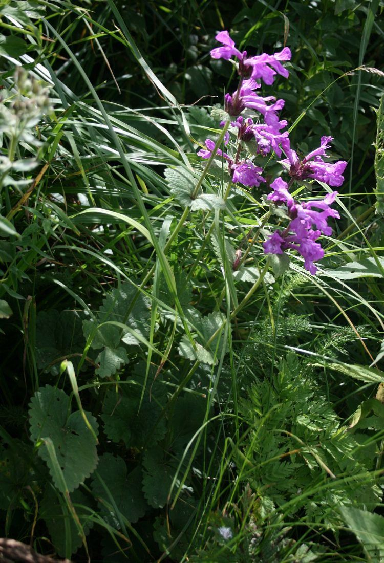 Betonica macrantha (= Stachys macrantha), Lippenblütler (Lamiaceae) – Georgien/საქართველო: Kleiner Kaukasus, an der Straße zum Tskhratskaro-Pass, ca. 4,9 km SSW Bakuriani/ბაკურიანი, ca. 2070 m s.m.